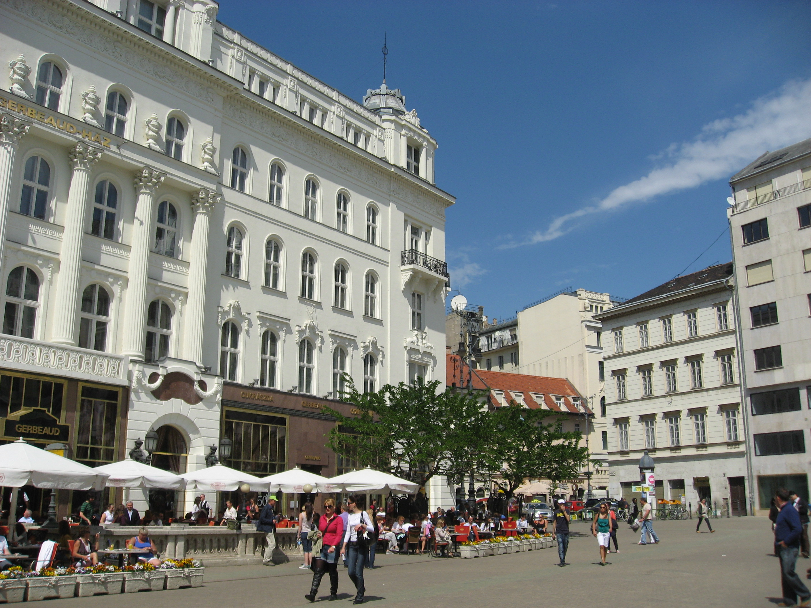 Budapešť